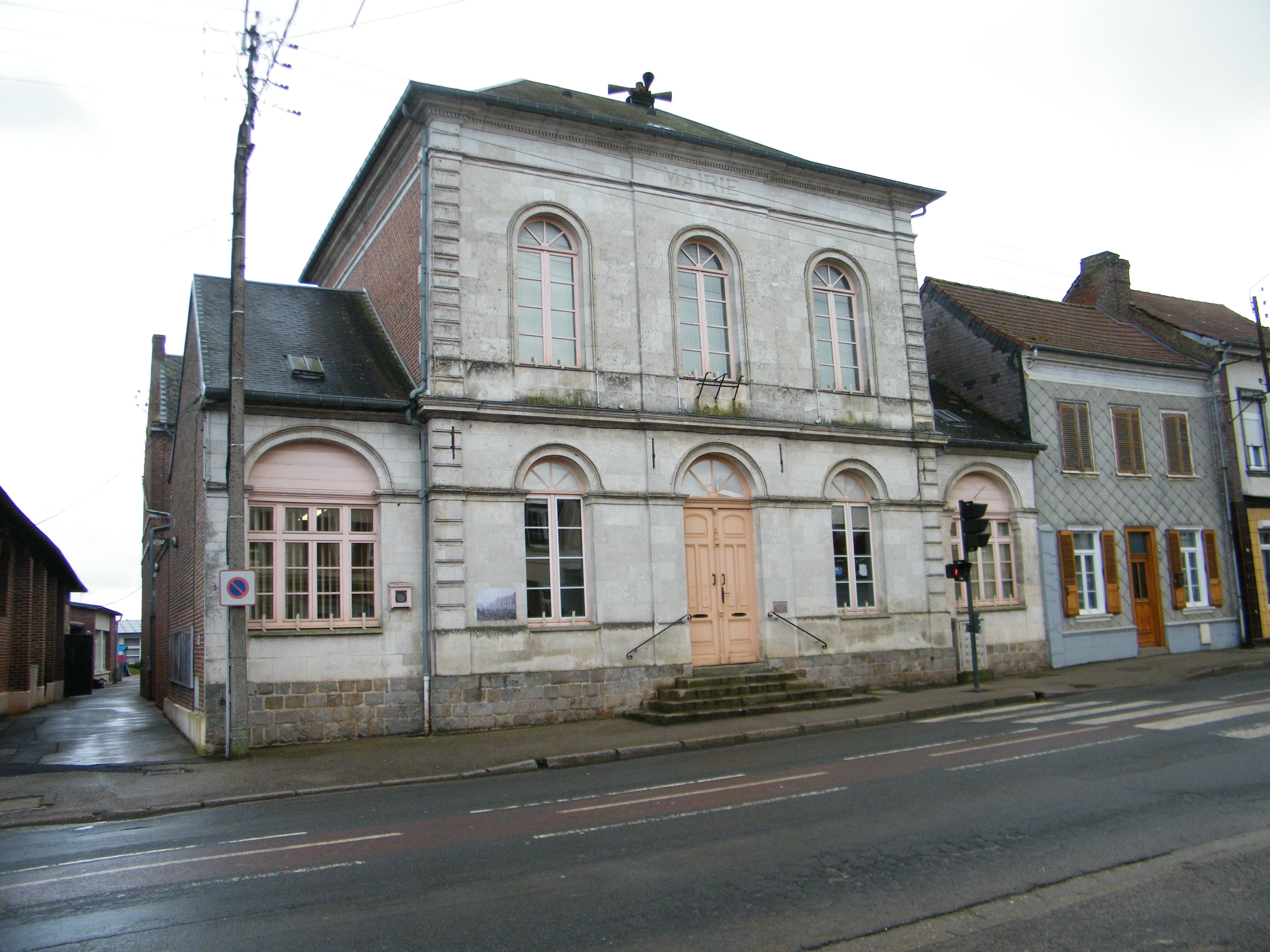 Mairie.